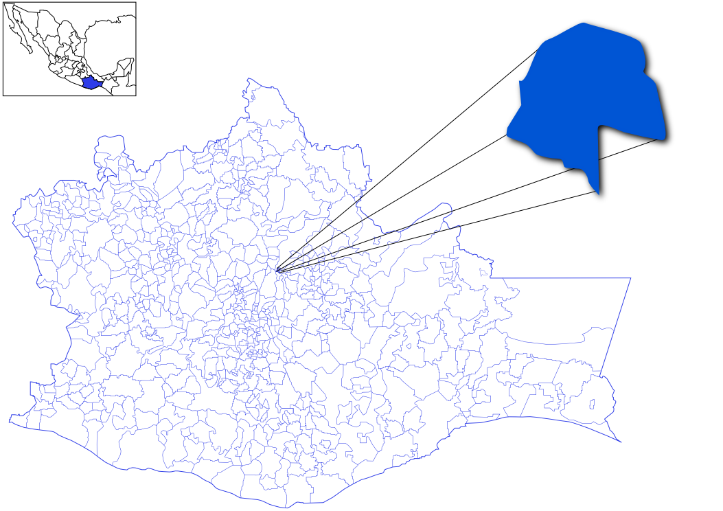 Mapa del municipio de Guelatao de Juàrez, Mèxico, elaborado con Inkscape.